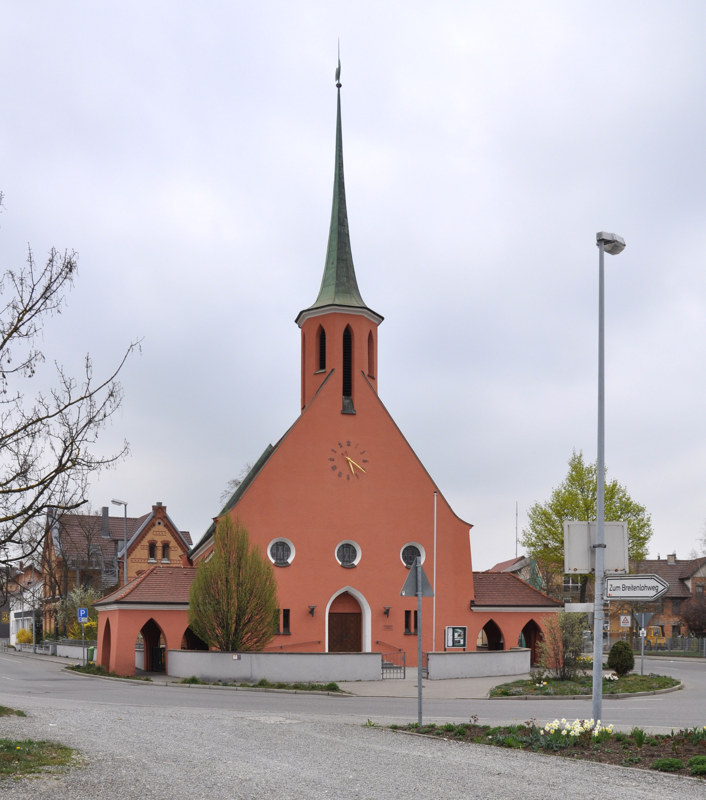 Bad Saulgau, Evangelische Christuskirche, Außenansicht